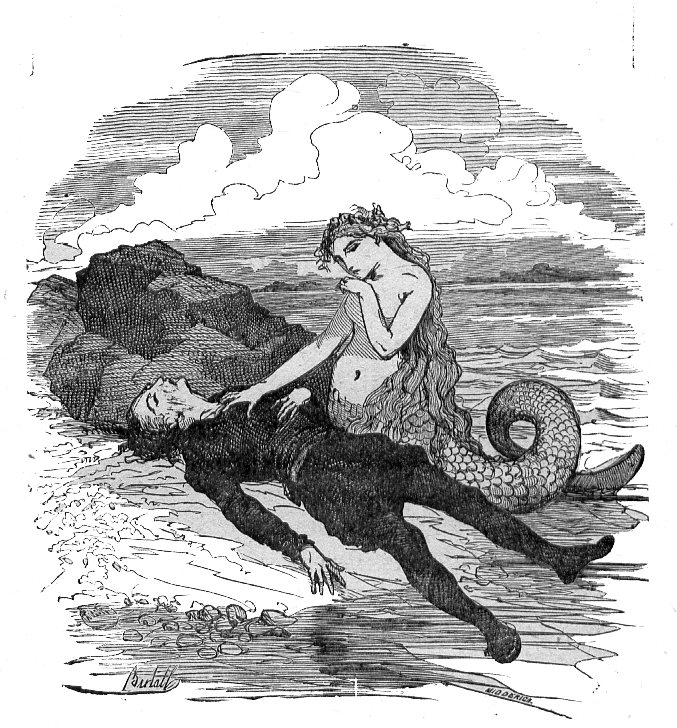 Pour la source voir : Discussion:Contes d’Andersen Vignette de La petite Sirène par Bertall représentant la petite sirène et le prince.